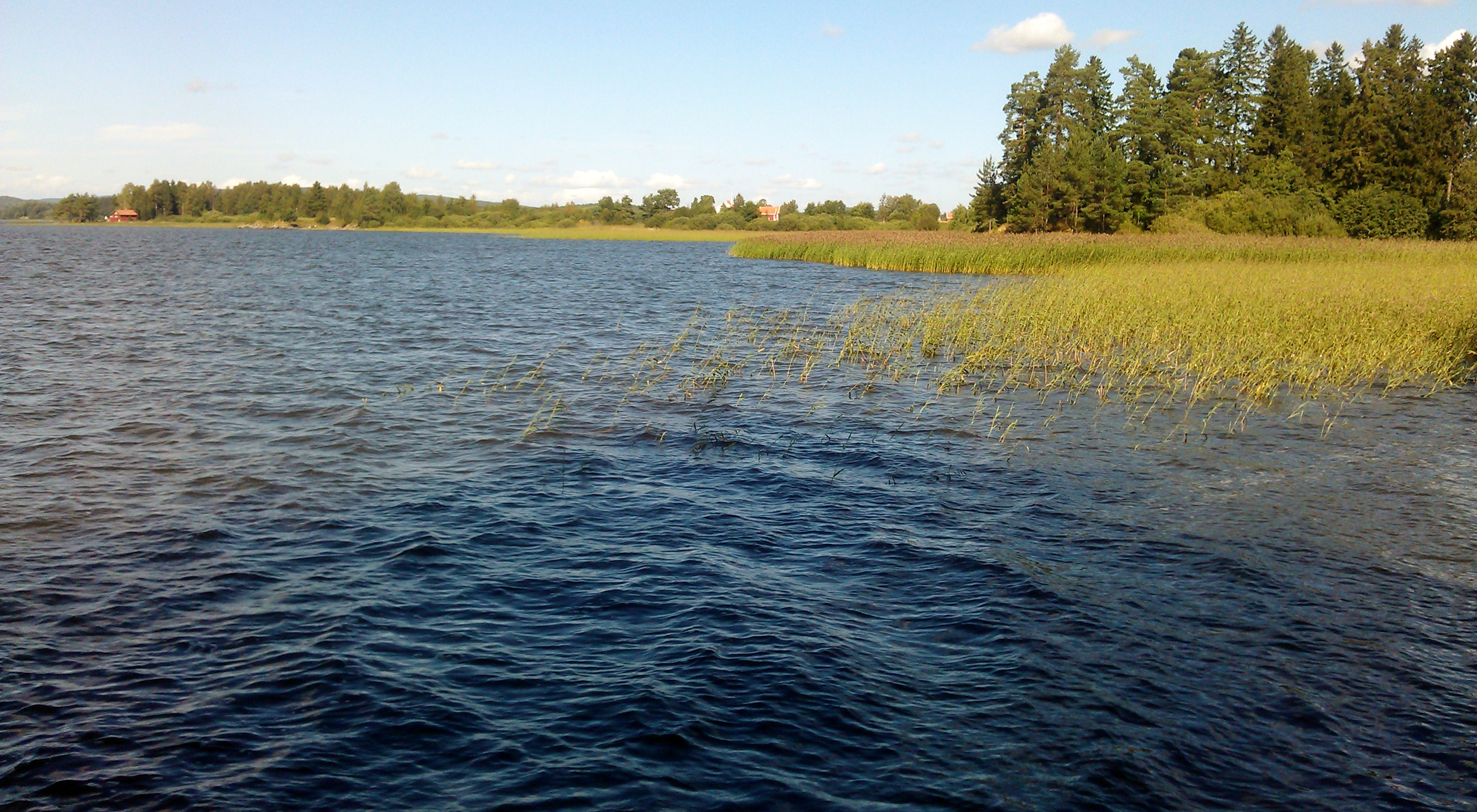 Hemnessjøen i Aurskog-Høland kommune, sett fra Langstranda.